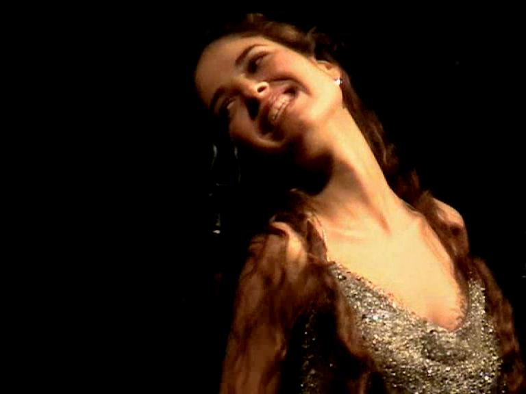 Tahis, October 7, 2006, "La Bombolla-La Mirona" (Girona)